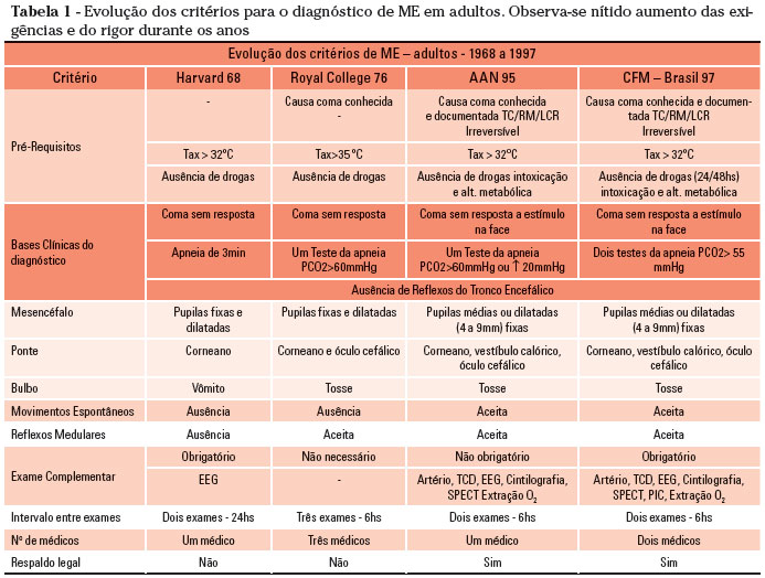 Observa-se um conceito central similar entre os diversos critérios, poucas diferenças práticas e melhora progressiva da aceitação e da operacionalidade durante o período. Observe que no Brasil ainda fazemos dois testes da apnéia.